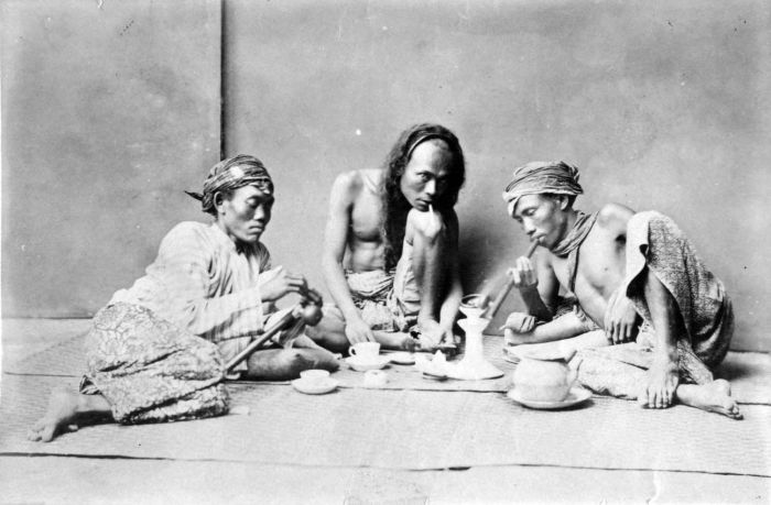 Foto. Drie opium rokende mannen